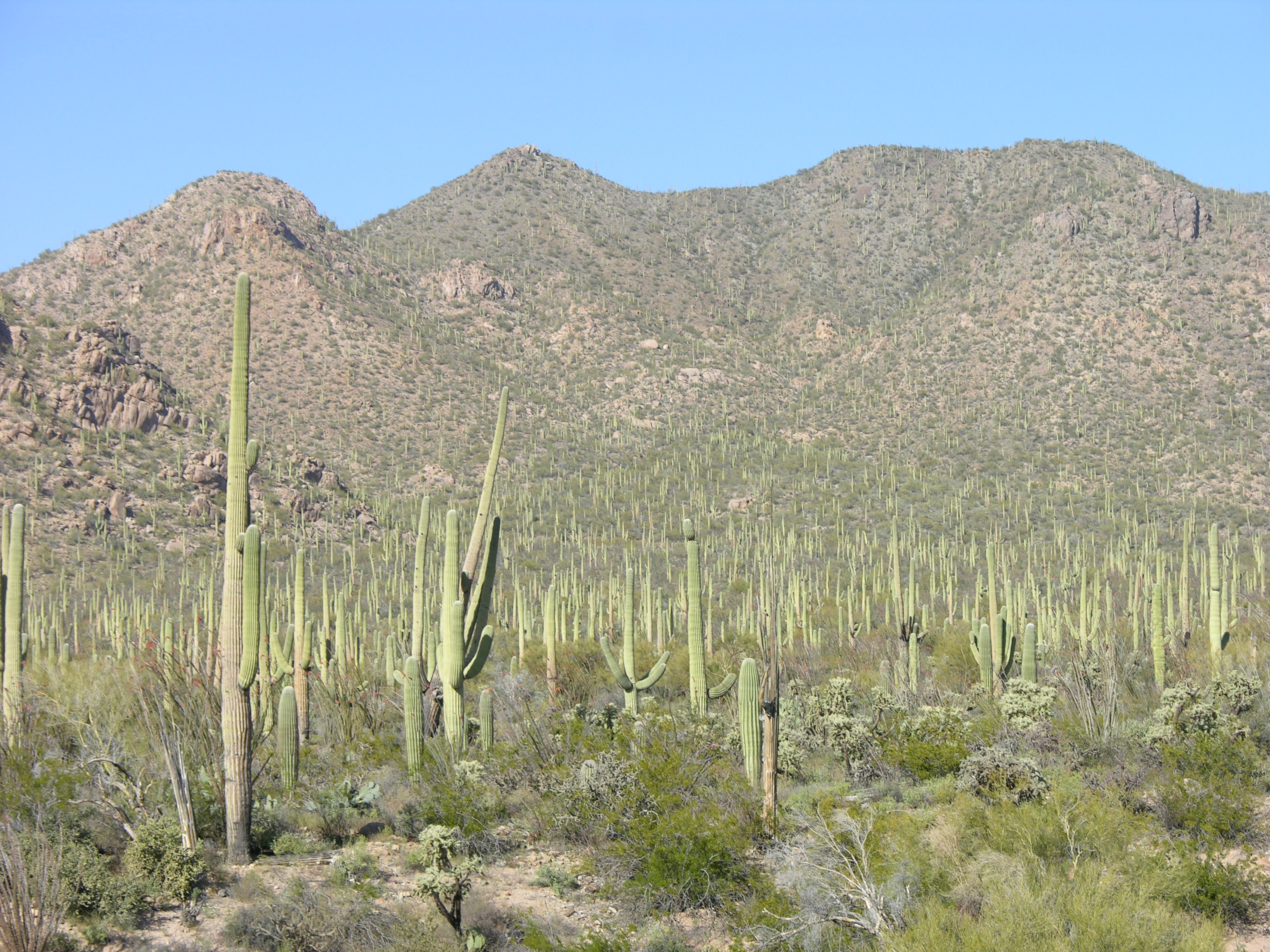 Saguaro (Carnegiea gigantea), Saguaro National Park, Arizona, USA